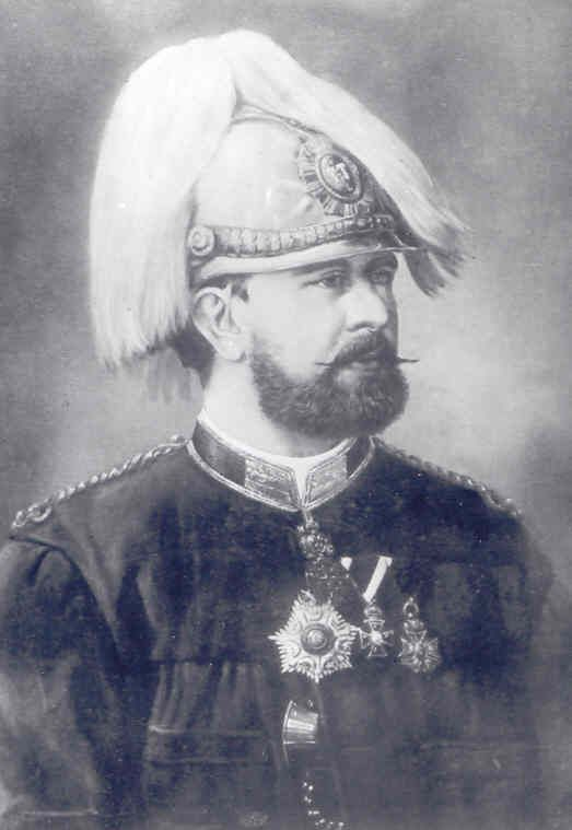 Sárvár-felsővidéki gróf -pasa Széchenyi Ödön György István Károly, Széchenyi István és Seilern Crescentia grófnőnek a fia, a konstantinápolyi tűzoltóság megalapítója.